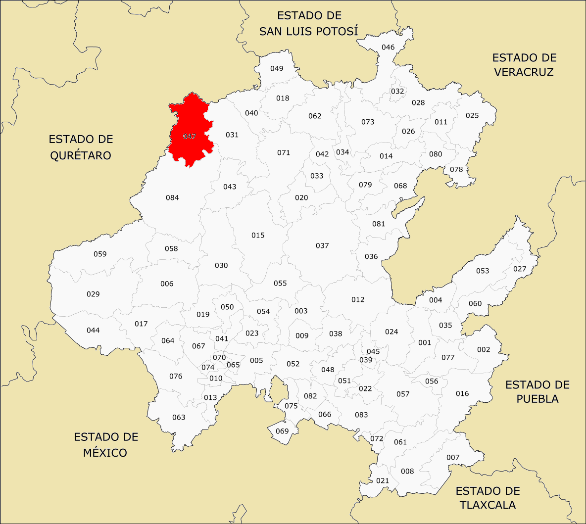 Municipio de Hidalgo